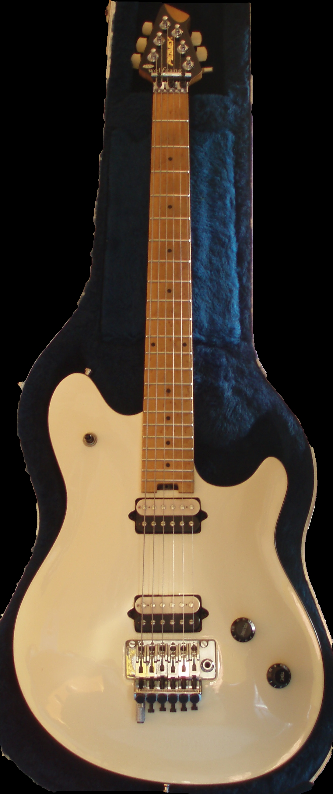 Peavey Wolfgang Special: Eddie van Halen Signature Modell